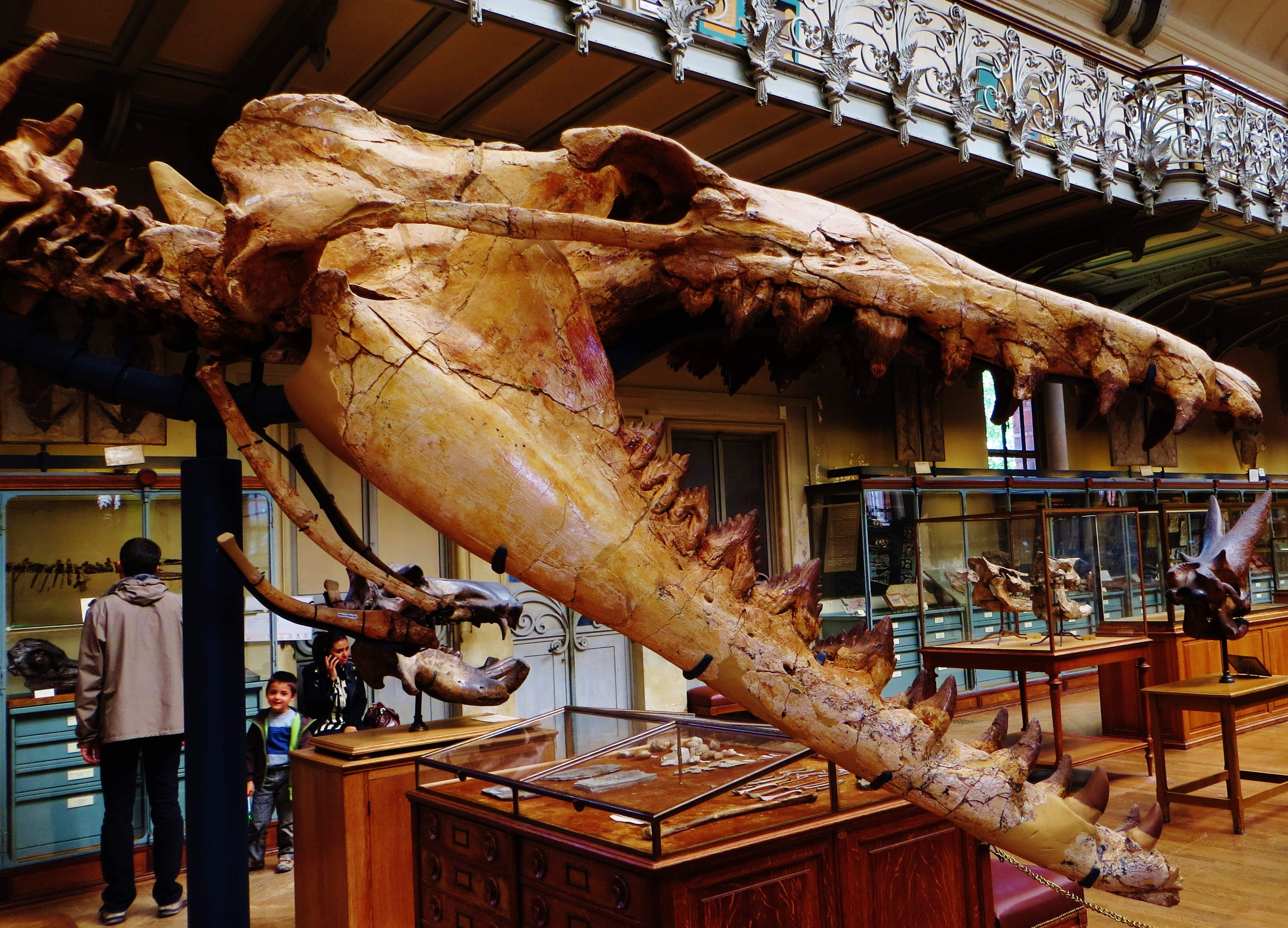 Fossil of Cynthiacetus, an extinct mammal - Took the photo at Musee d'Histoire Naturelle, Paris